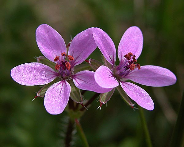 Reiherschnabel (erodium cicutarium), aufgenommen in Buseck